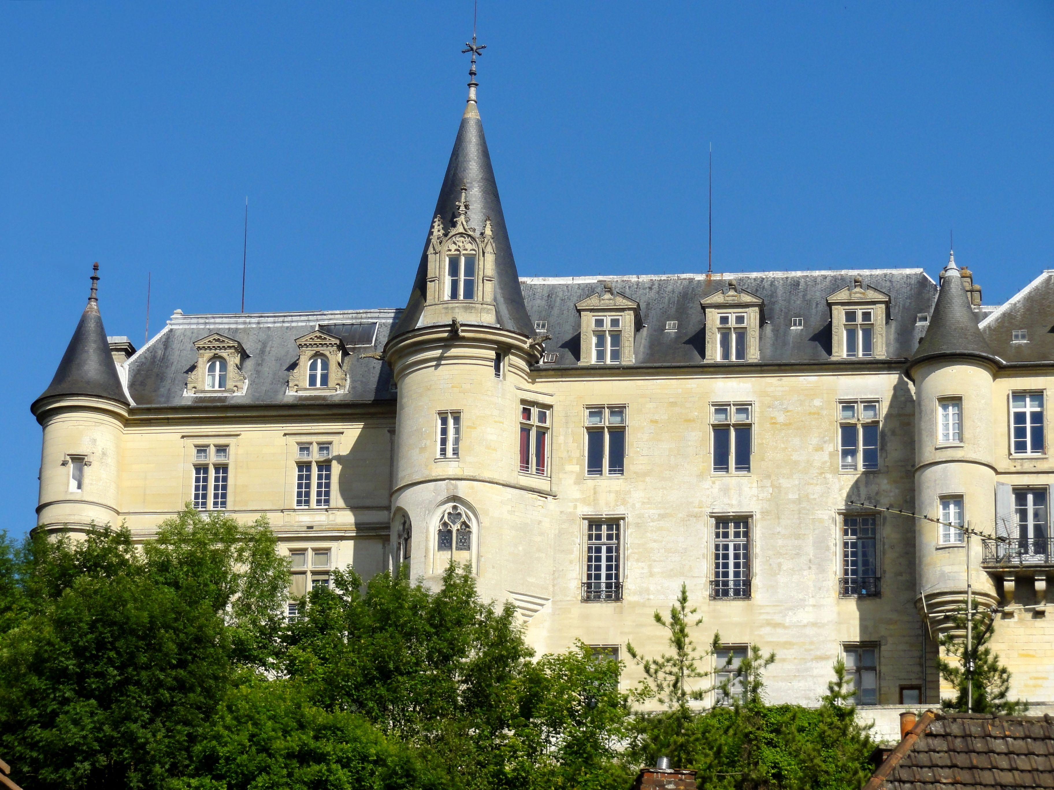 Château de Mello.